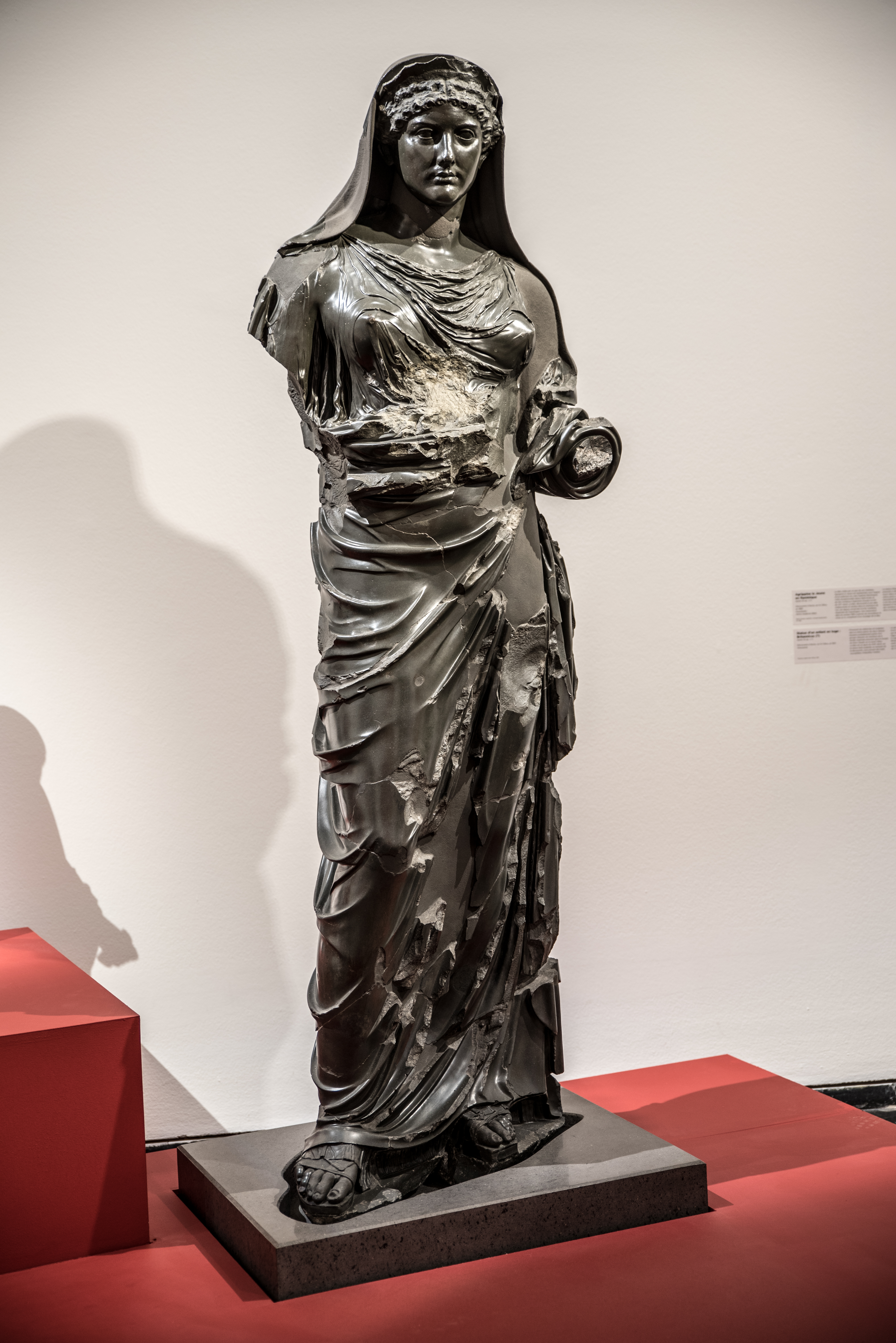 Claude, un empereur au destin singulier - Exposition au musée des Beaux-Arts de Lyon - 2018